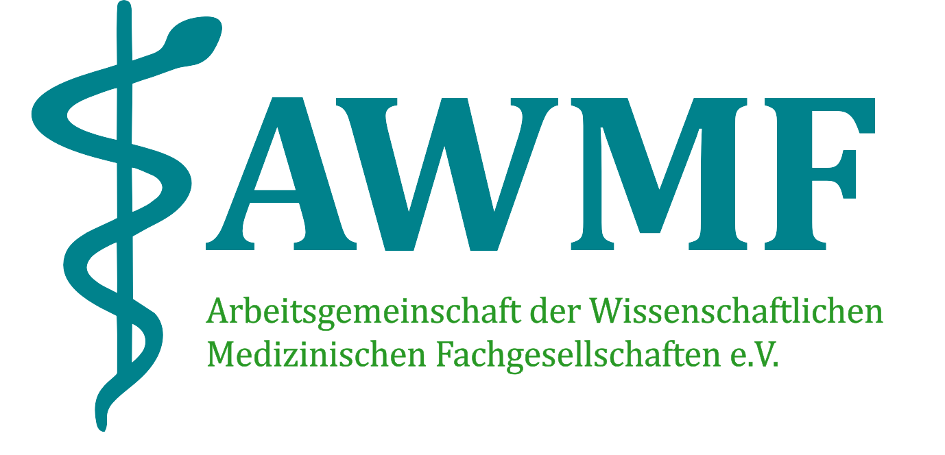 neues Logo der AWMF